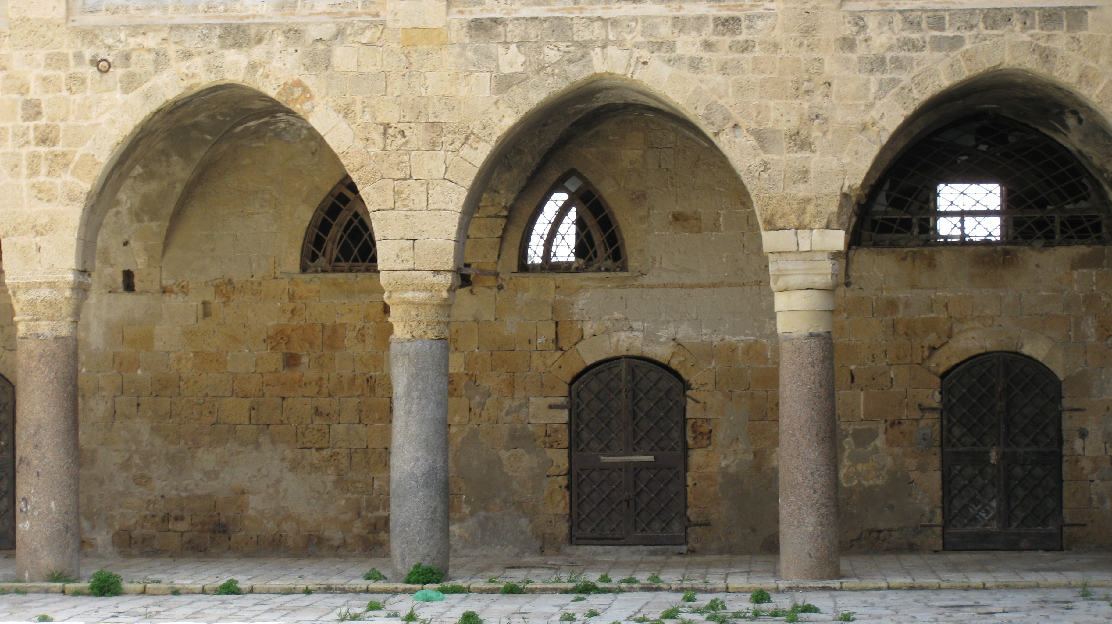 Acco (Acre, Akko) - Khan al-Umdan עכו - חאן אל עומדאן